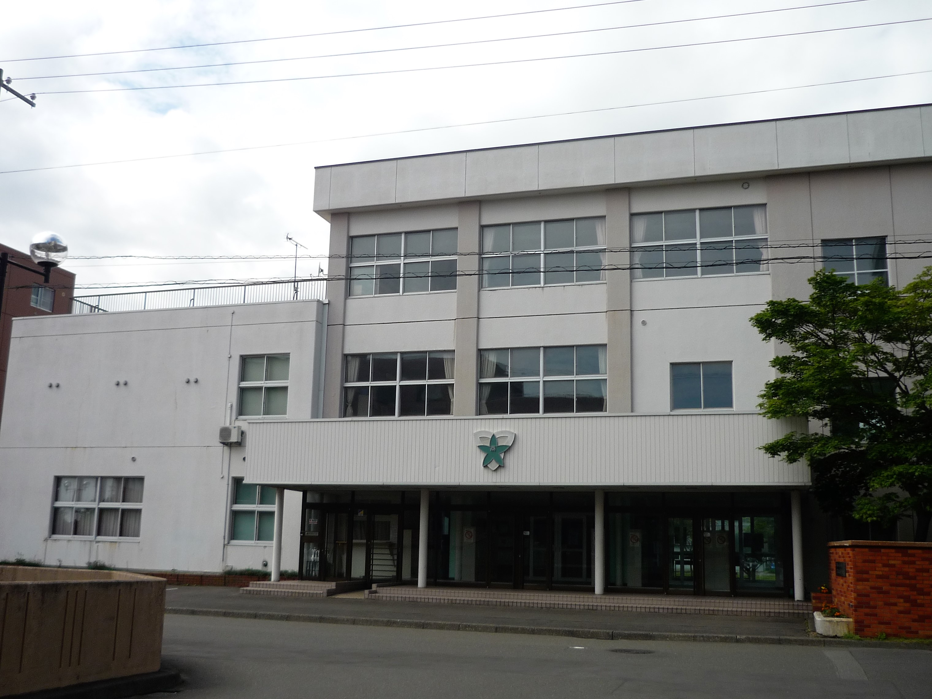 苫小牧高等商業学校 Panasonic Lumix DMC-FS3